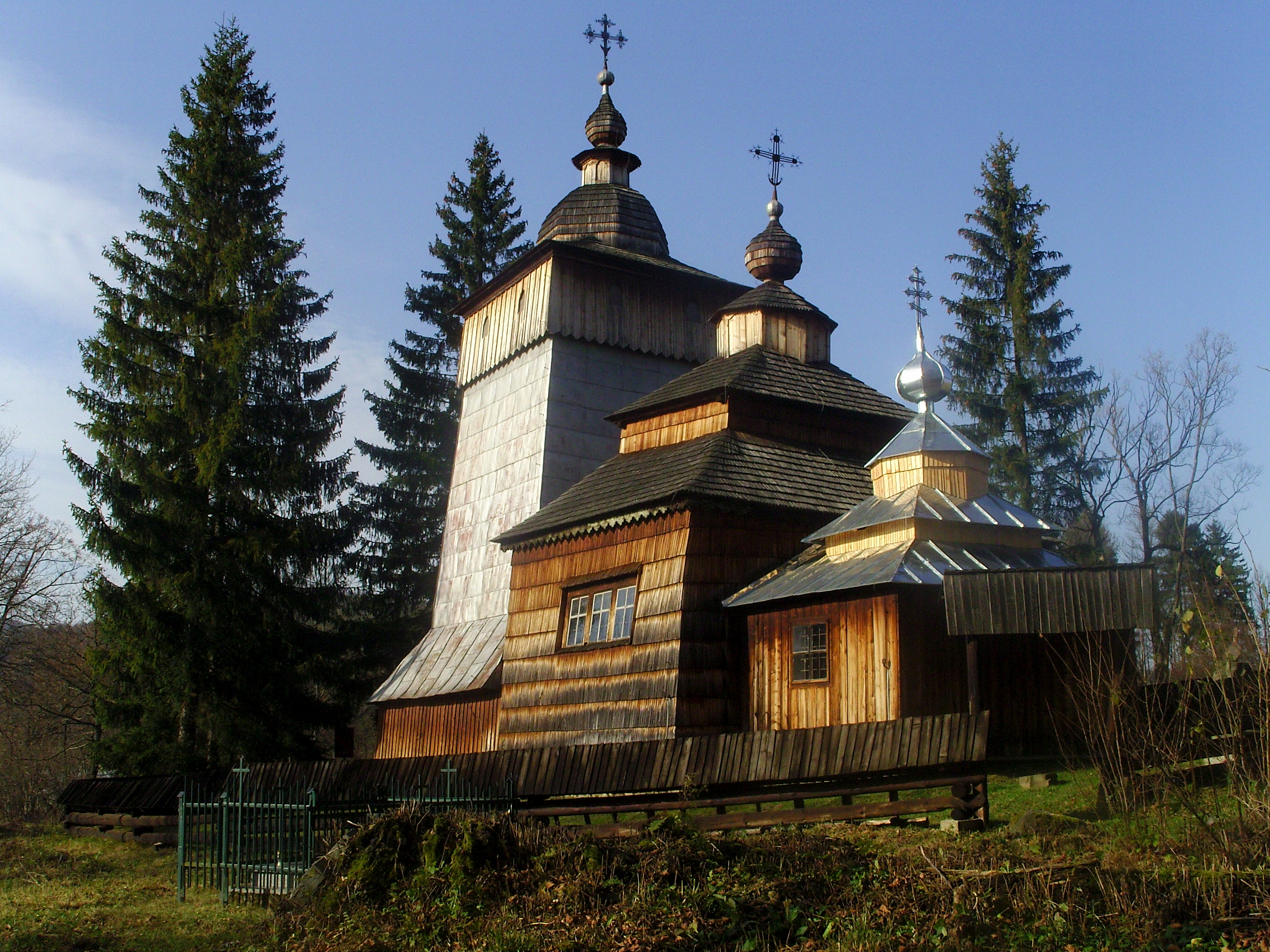 Dawna cerkiew grekokatolicka (obecnie prawosławna) p.w. Opieki Bogurodzicy w Wołowcu z XVIIII wieku